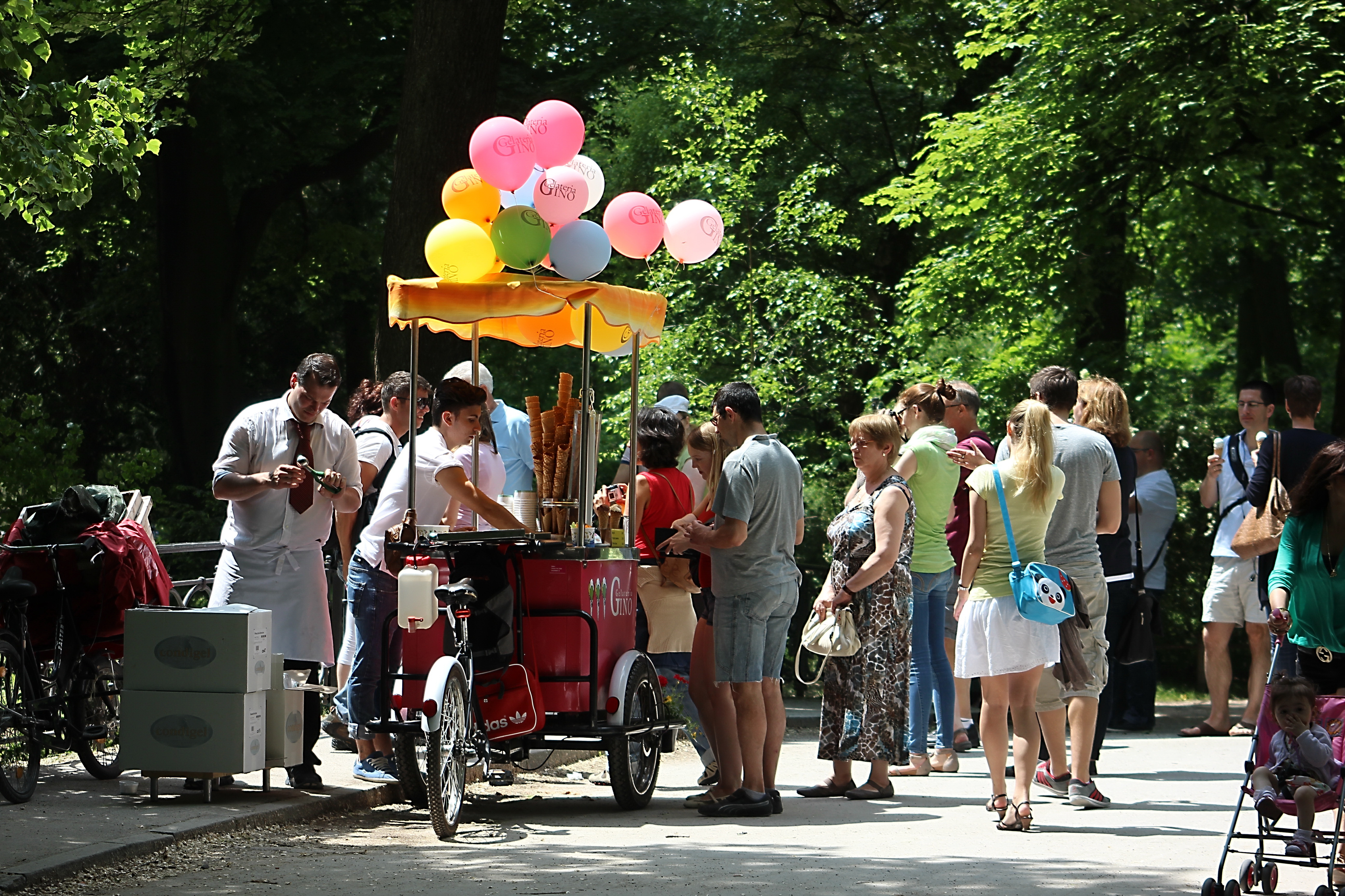 Eisverkauf vom Fahrrad aus im Englischen Garten in München.